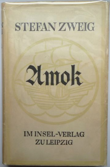 Der Autor starb vor mehr als 70 Jahren (1942). Es ist kein Umschlaggestalter im Buch oder auf dem SU genannt. Das Bild des Buches ist somit gemeinfrei.